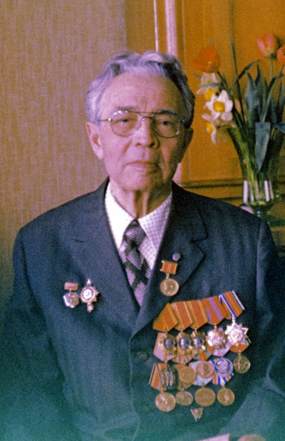 Муратов З.И. (фото из семейного архива)